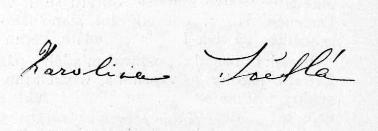 Karolína Světlá - Podpis (1830–1899)